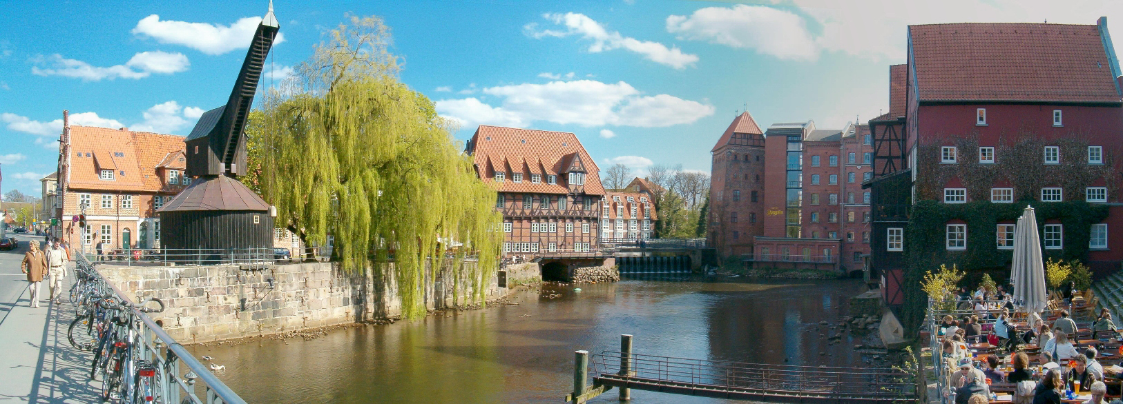 Selbstfotografiertes Panorama des Stints in Lüneburg mit Blick auf das Bergström